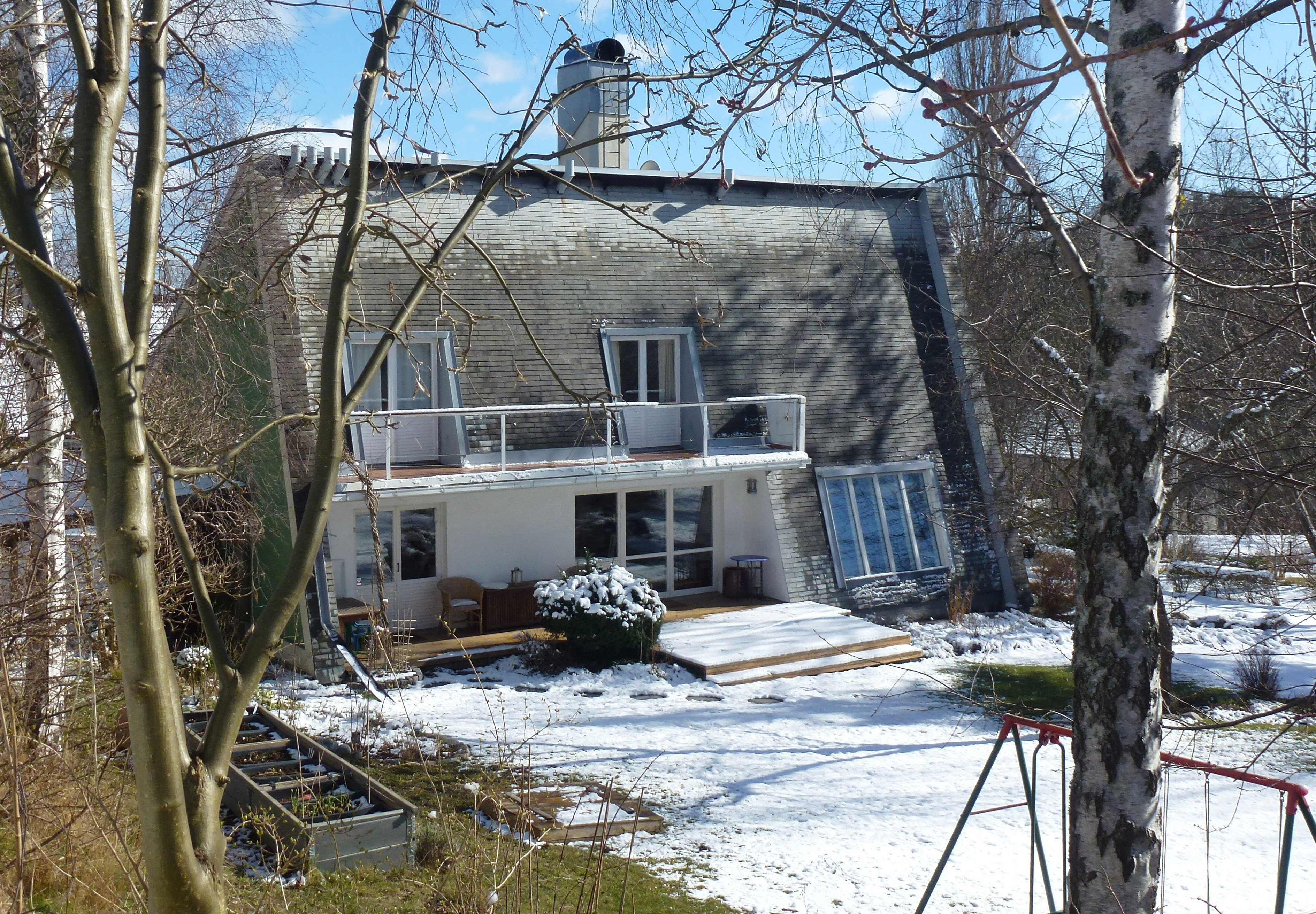 Villa Molin, trädgårdsarkitekten Ulla Molins villa på Lidingö, ritad av Ralph Erskine 1947